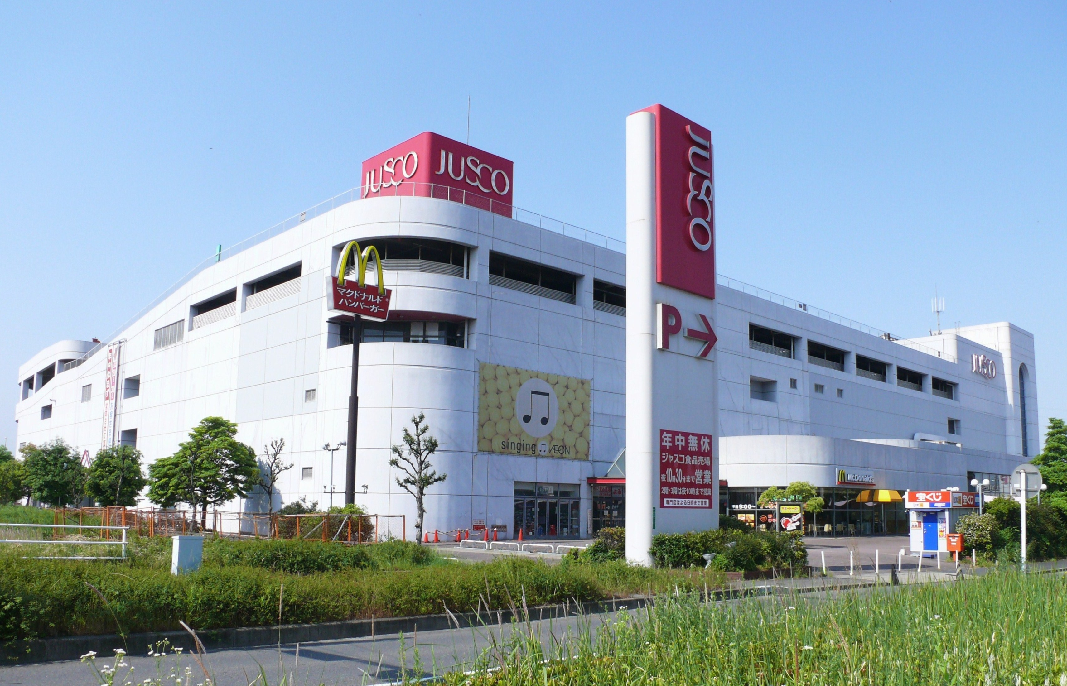 イオンリテール株式会社が管理運営するジャスコシティ南陽（ジャスコ南陽店）